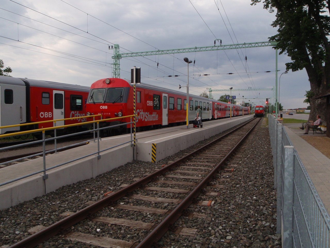 Pomogy állomás. Az 1 és 3 vágányon összesen 3 ingavonat várakozik, a 2. vágányon Fertőszentmiklósra induló 16.56-os személyvonat.